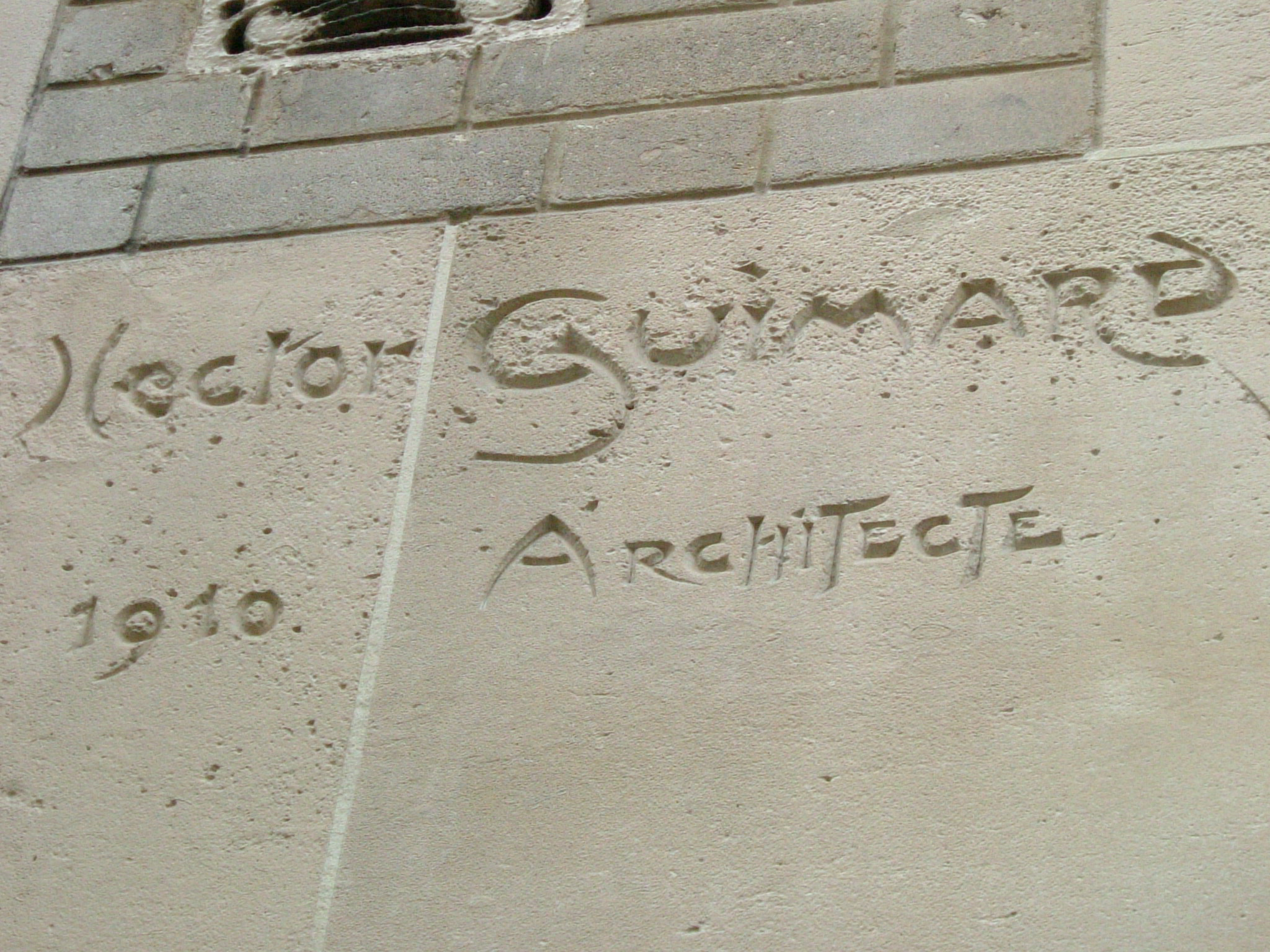 Signatur des Architekten Hector Guimard, Rue Jean-de-La-Fontaine (Paris)